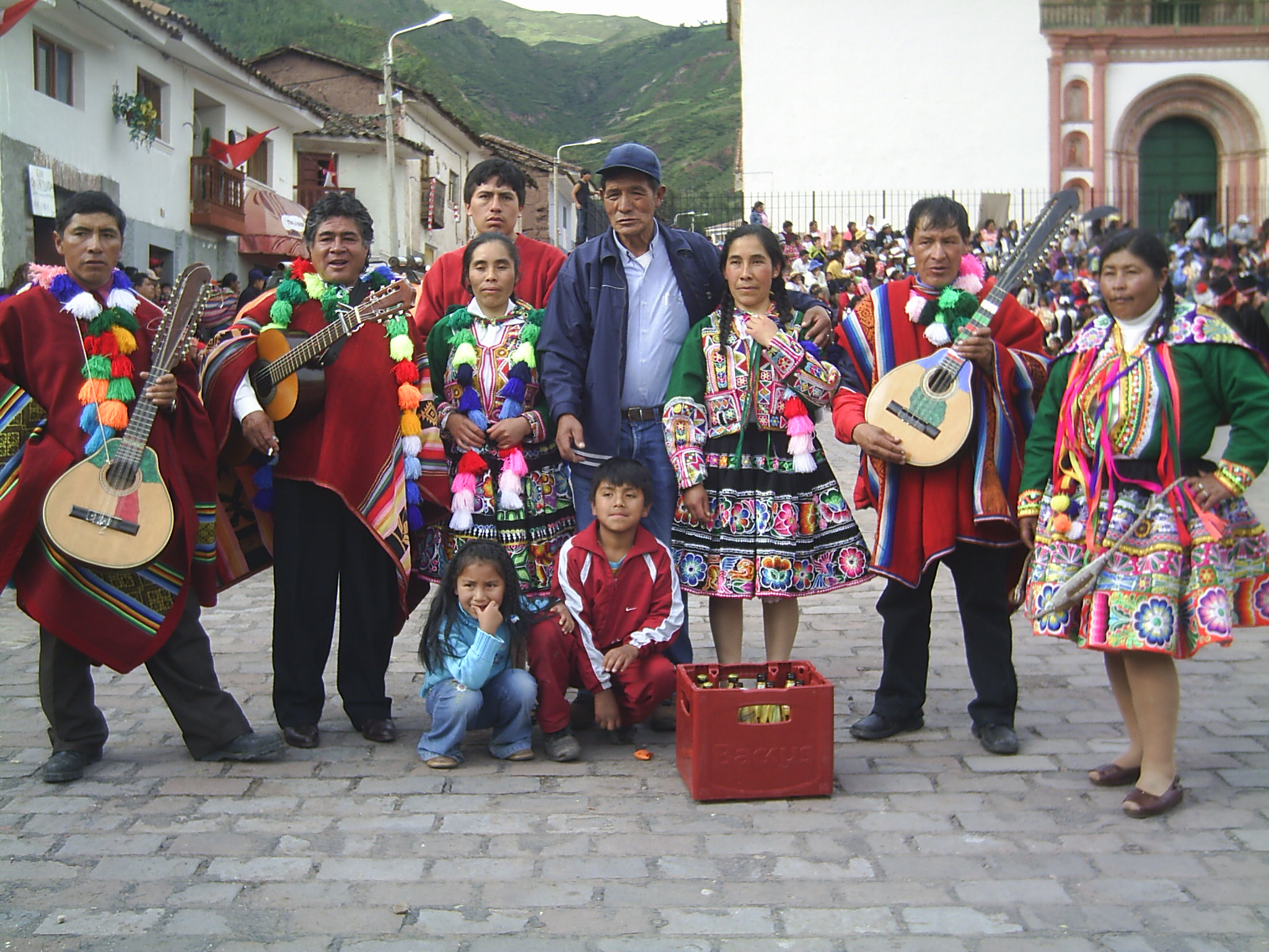 Grupo de música.